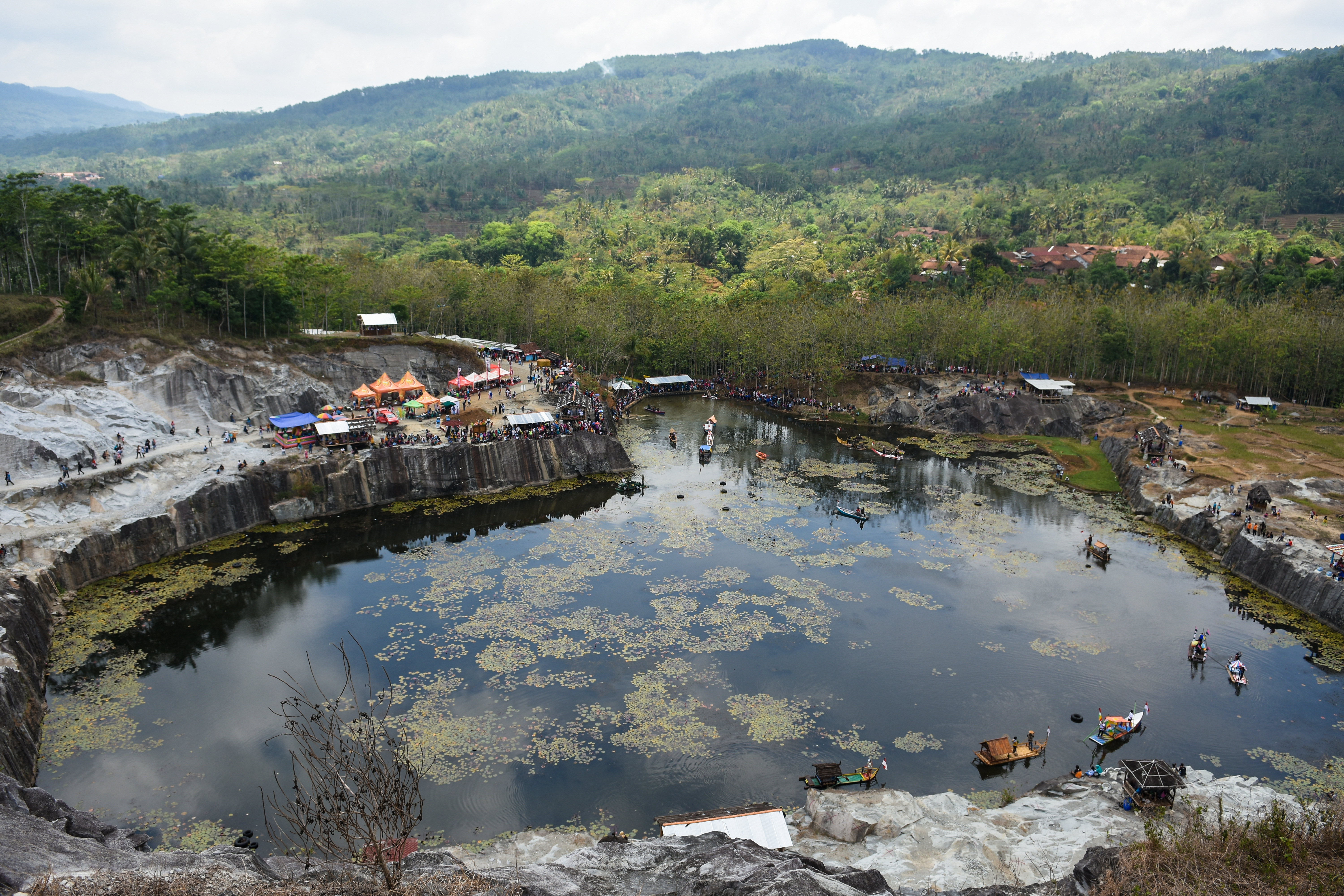 Destinasi Wisata Tampomas merupakan salah satu wisata yang ada di Banjarnegara. Lokasinya berada di desa Gentansari, Kec. Pagedongan, Kab. Banjarnegara. Tampomas Banjarnegara ini menyuguhkan keindahan alam berupa tebing batu dan danau alami yang berada ditengahnya. Anda bisa menaiki perahu kayu untuk mengelilingi danau sambil melihat bunga teratai yang menghiasi danau tersebut.